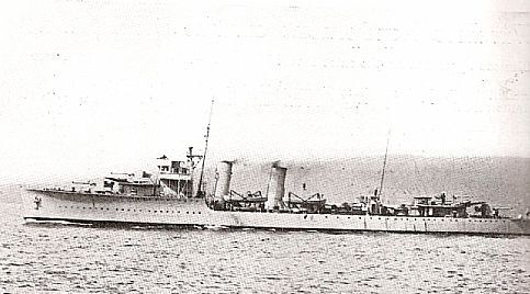 Der bei Yarrow gebaute portugiesische Zerstörer Vouga